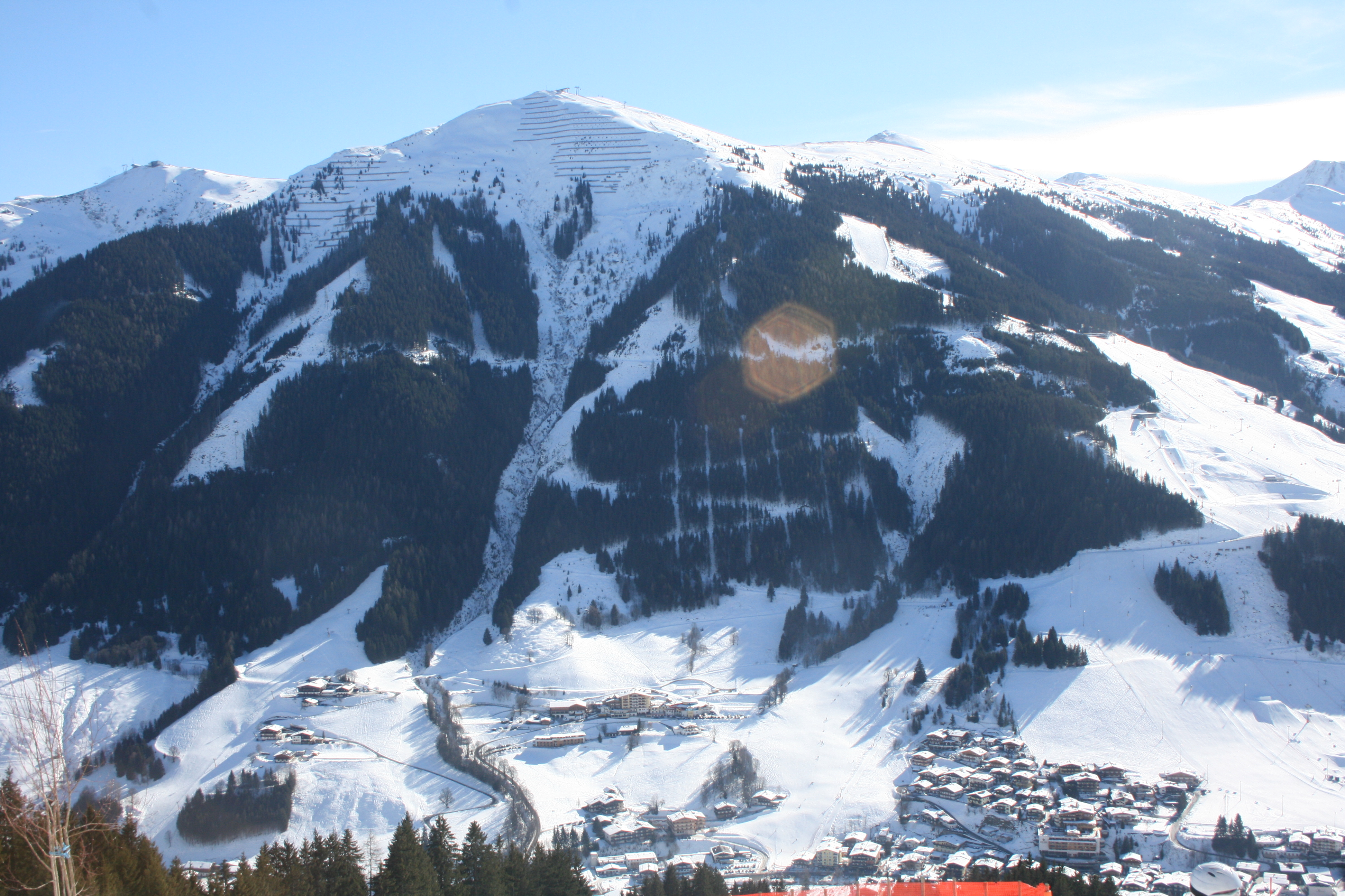 Hinterglemm and Schattberg West